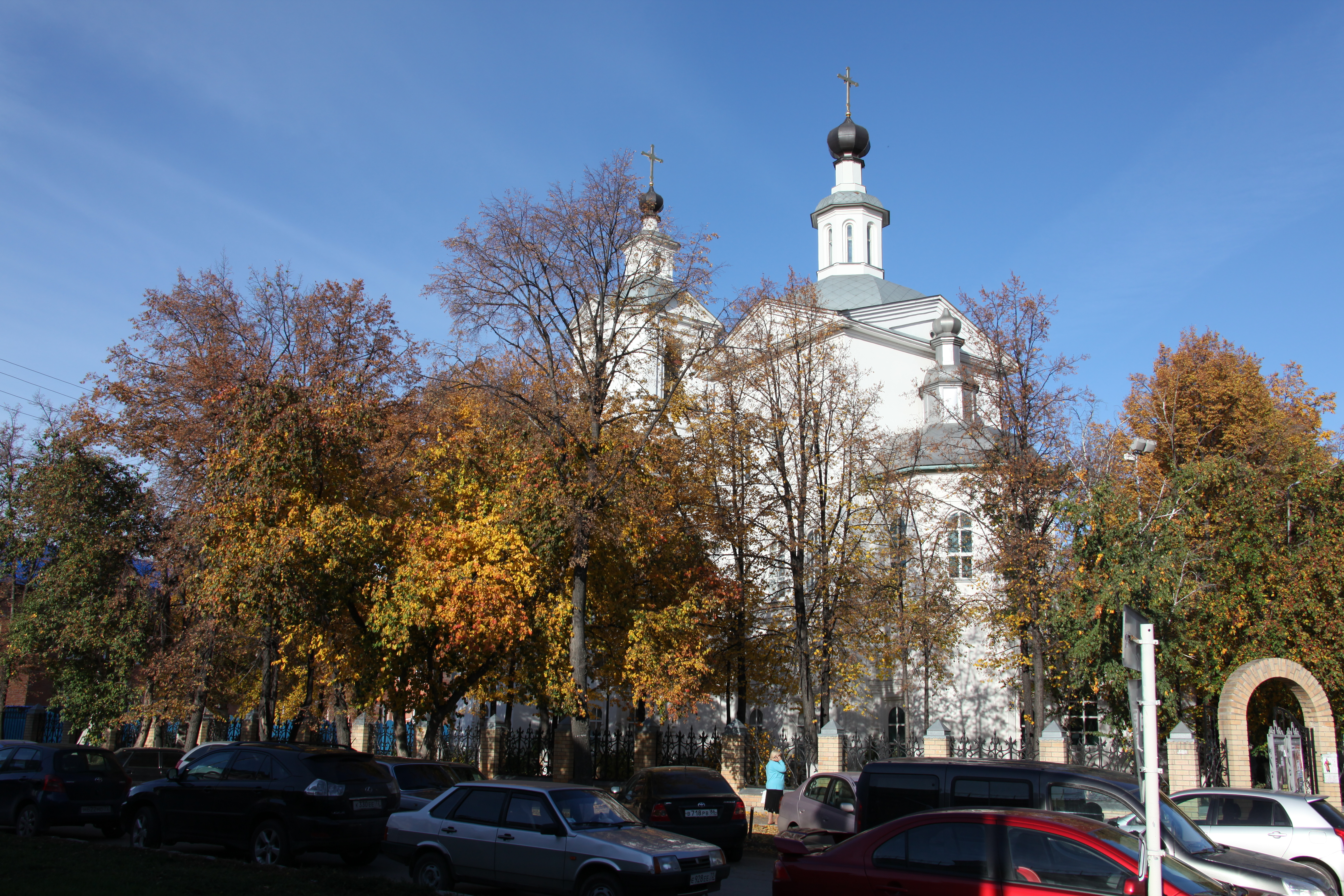 La preĝejo de ĉefanĝelo Mikaelo. Tjumeno, Rusio.